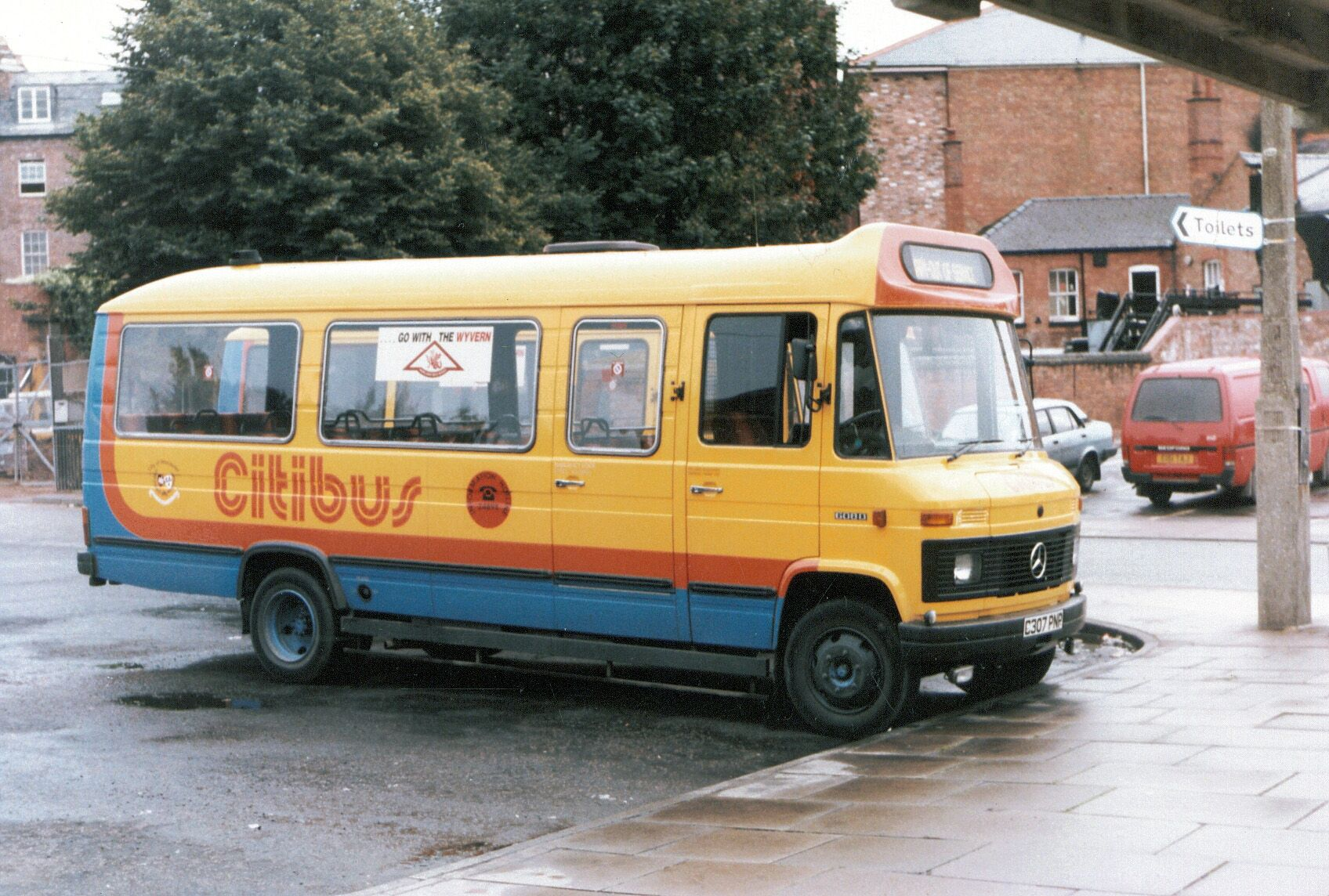 1307-a 260887 cps